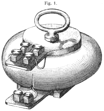 Ringkerntransformator der Beleuchtungsanlage in Luzern (1886) Transformatoren dieses Typ wurde 1885 von der Firma Ganz aus Budapest für die Stallbeleuchtung auf der Landesausstellung in Budapest gebaut.